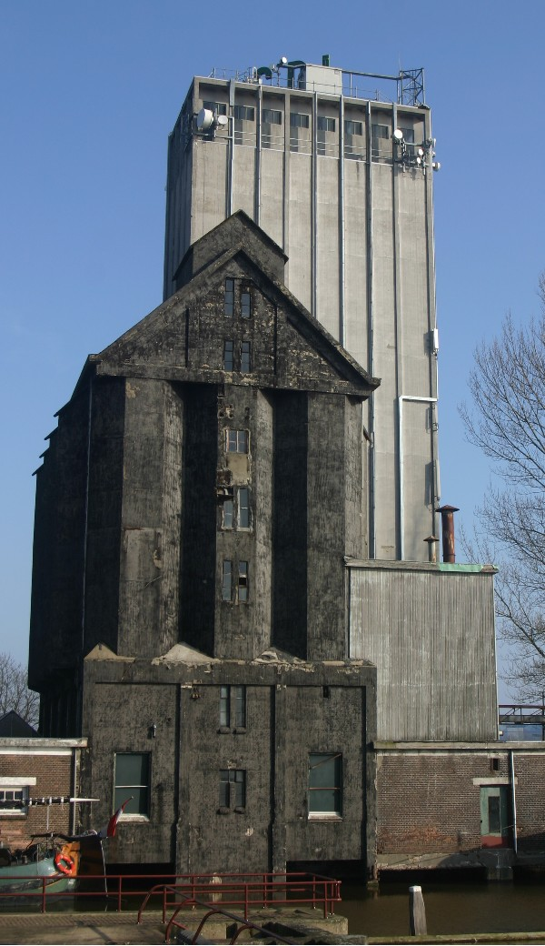 Zelf gemaakte foto. Bij het noemen van bron (Wikipedia) en auteur (T. Nijeholt) mag dit vrij overgenomen worden.